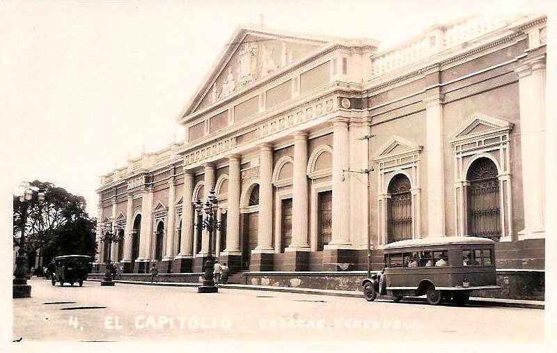 Edificio del Capitolio Federal en Caracas - Venezuela